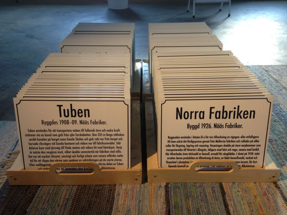 94 historiska skyltar är utplacerade i Tollered sedan maj 2013. Här syns de tillsammans efter leverans, strax innan montering.